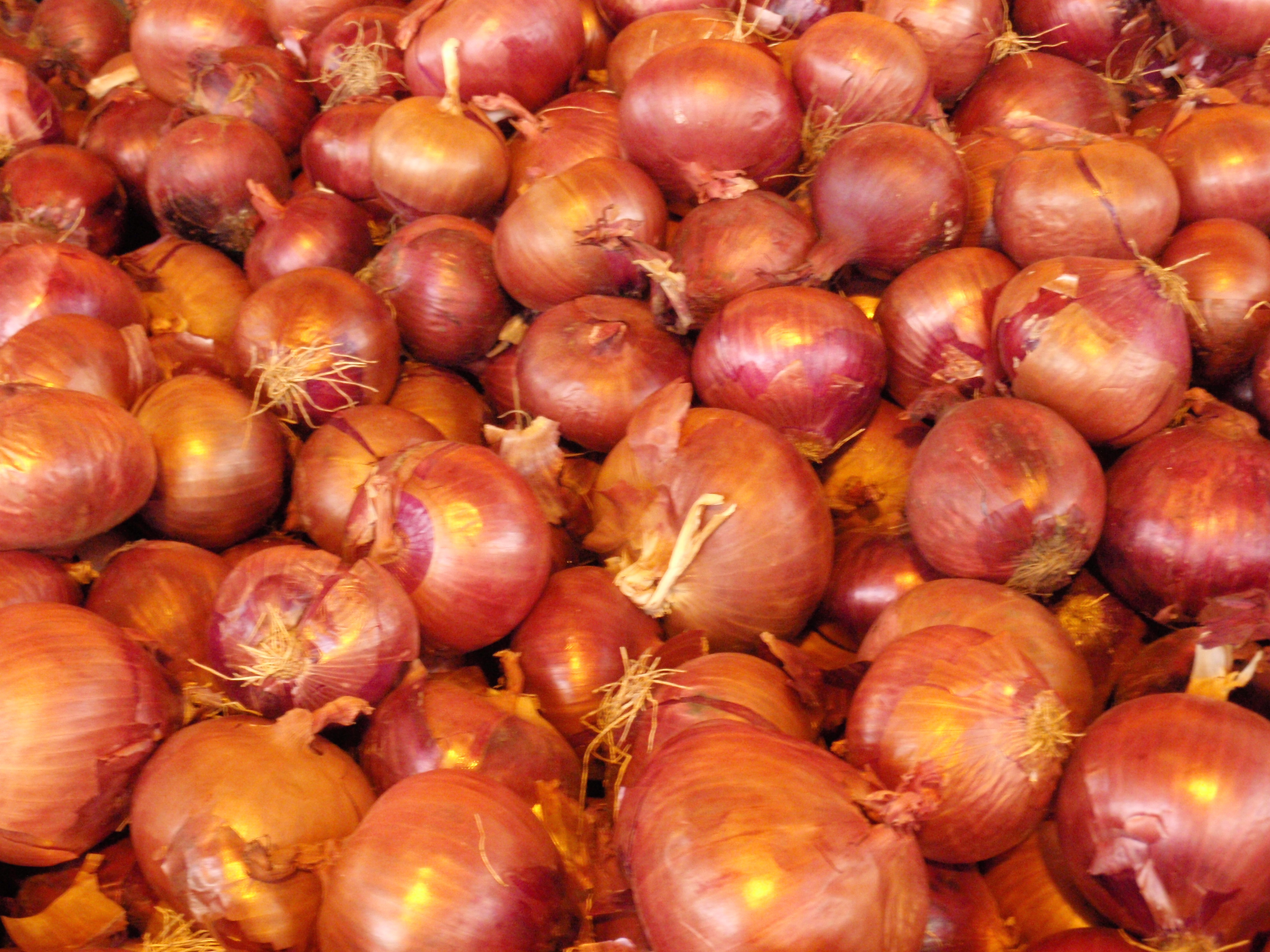 Shuk Hsayarim ירקות בשוק הסיירים